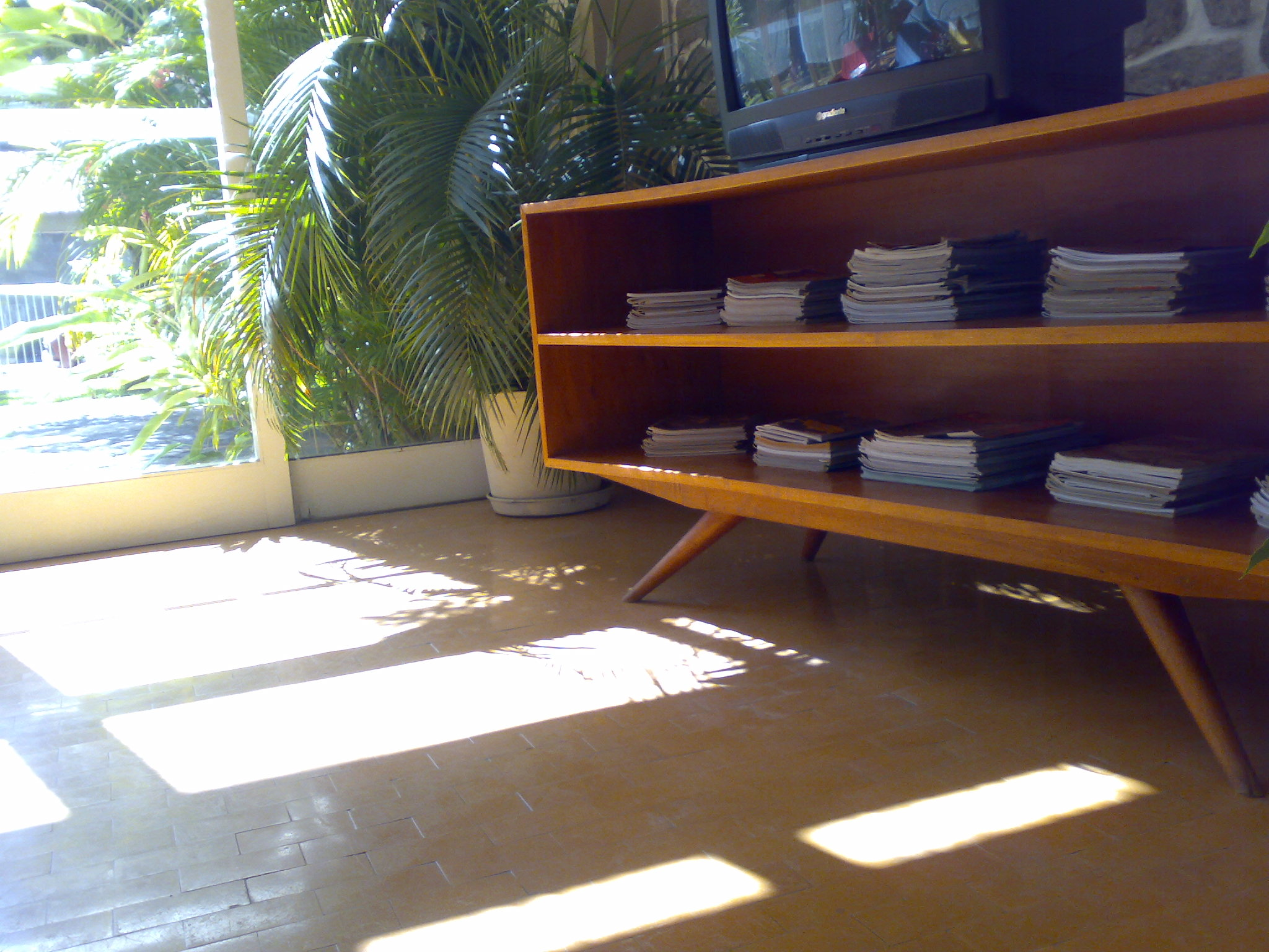 Móvel projetado por Joaquim Tenreiro no hall do Hotel Cataguases.